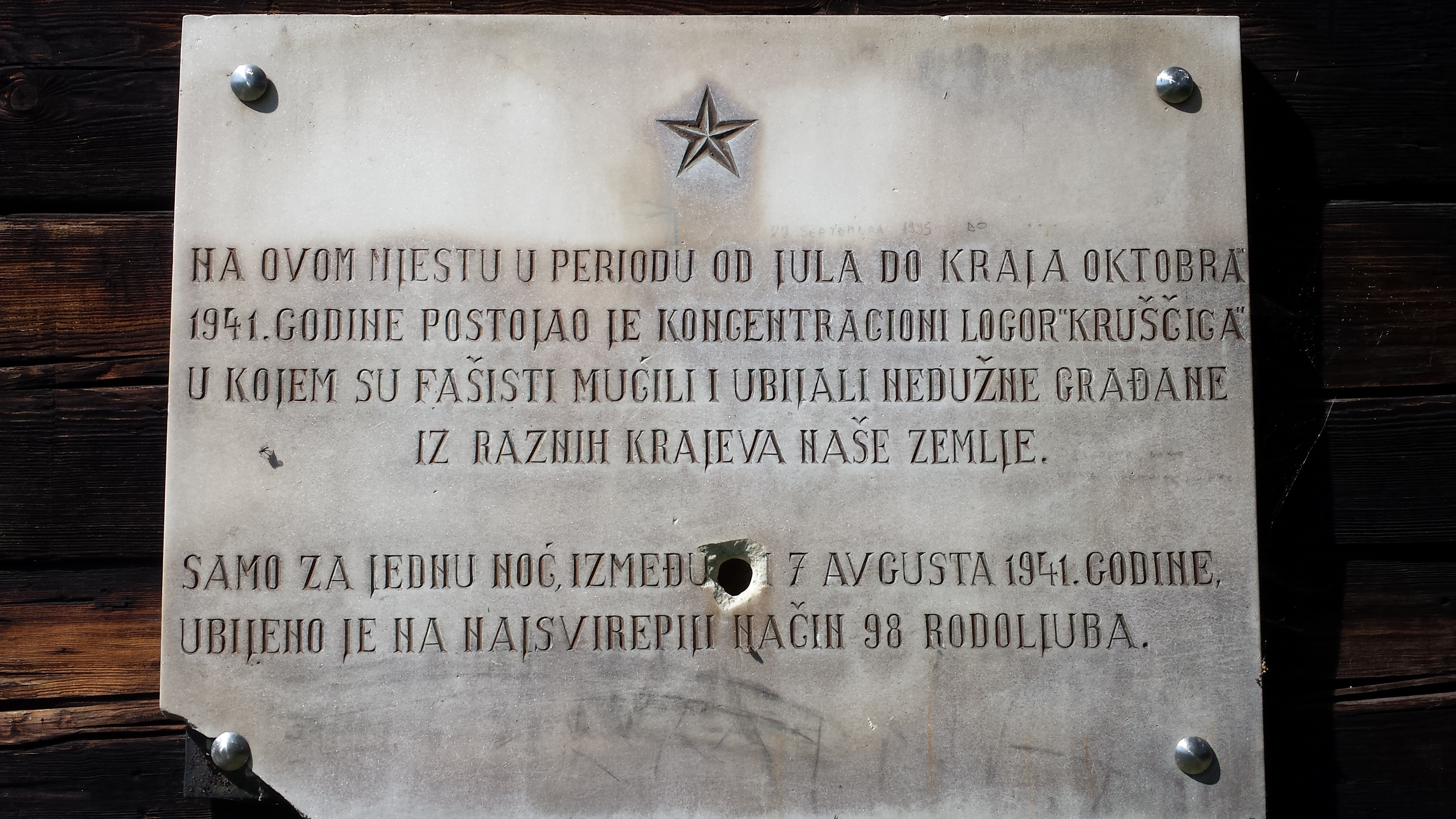 Spomen ploča na zgradi bivšeg koncentracionog logora Kruščica u Vitezu, Bosna i Hercegovina